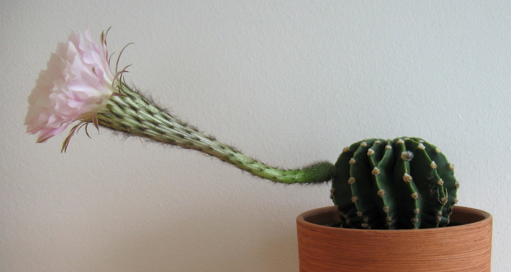 Blüte eines Kaktus der Gattung Echinopsis von der Seite Echinopsis oxygona